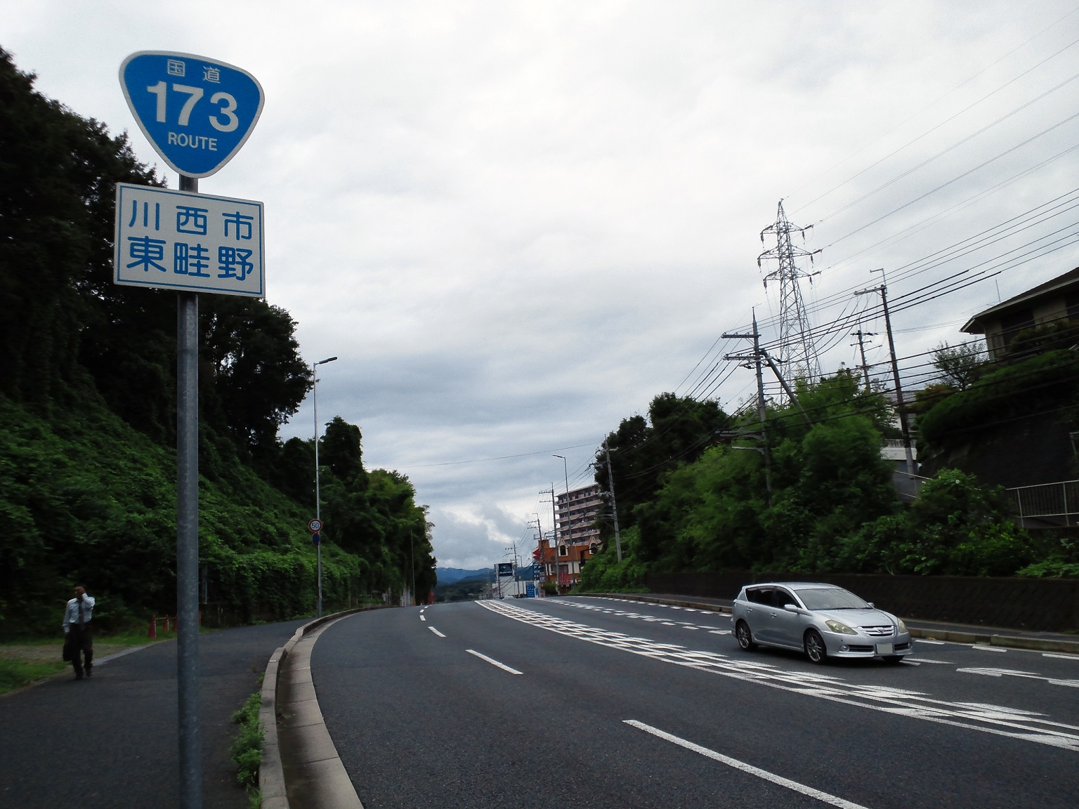 川西市東畦野付近の国道173号。